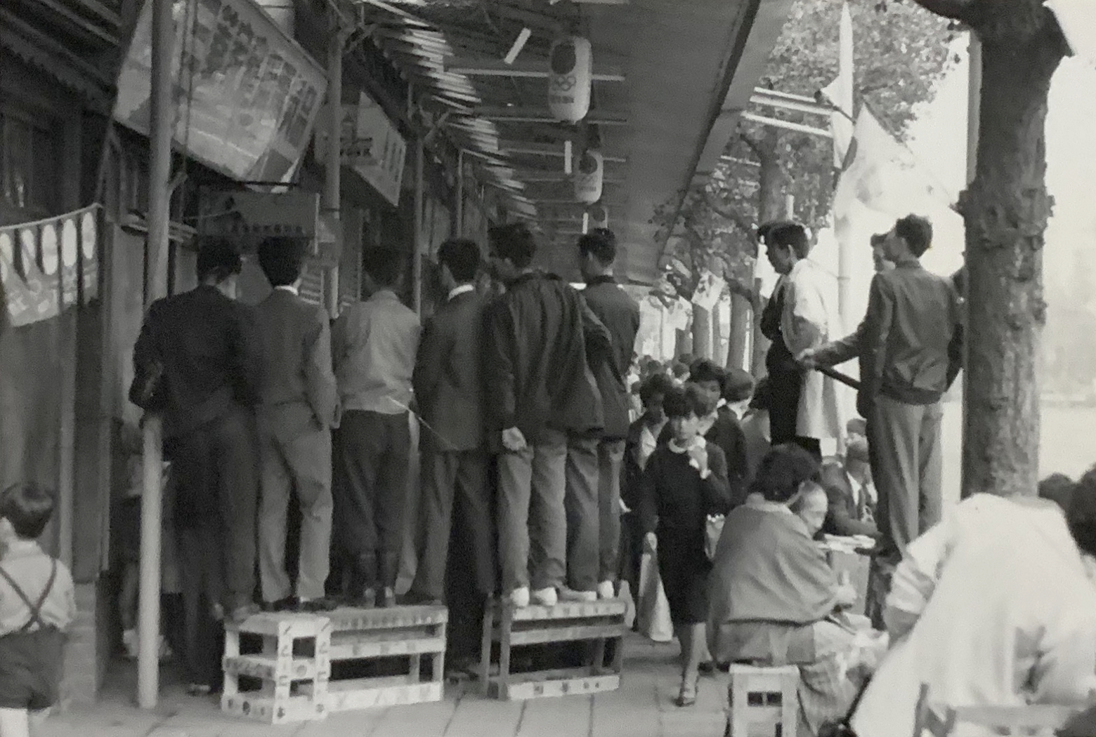 街頭テレビで東京オリンピックを観戦する市民